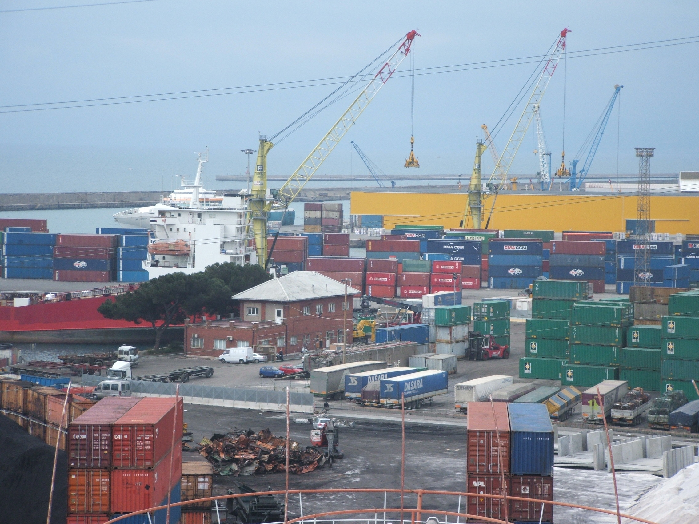 Immagine dal Porto di Genova (terminal, moli, container, calate, ecc.)